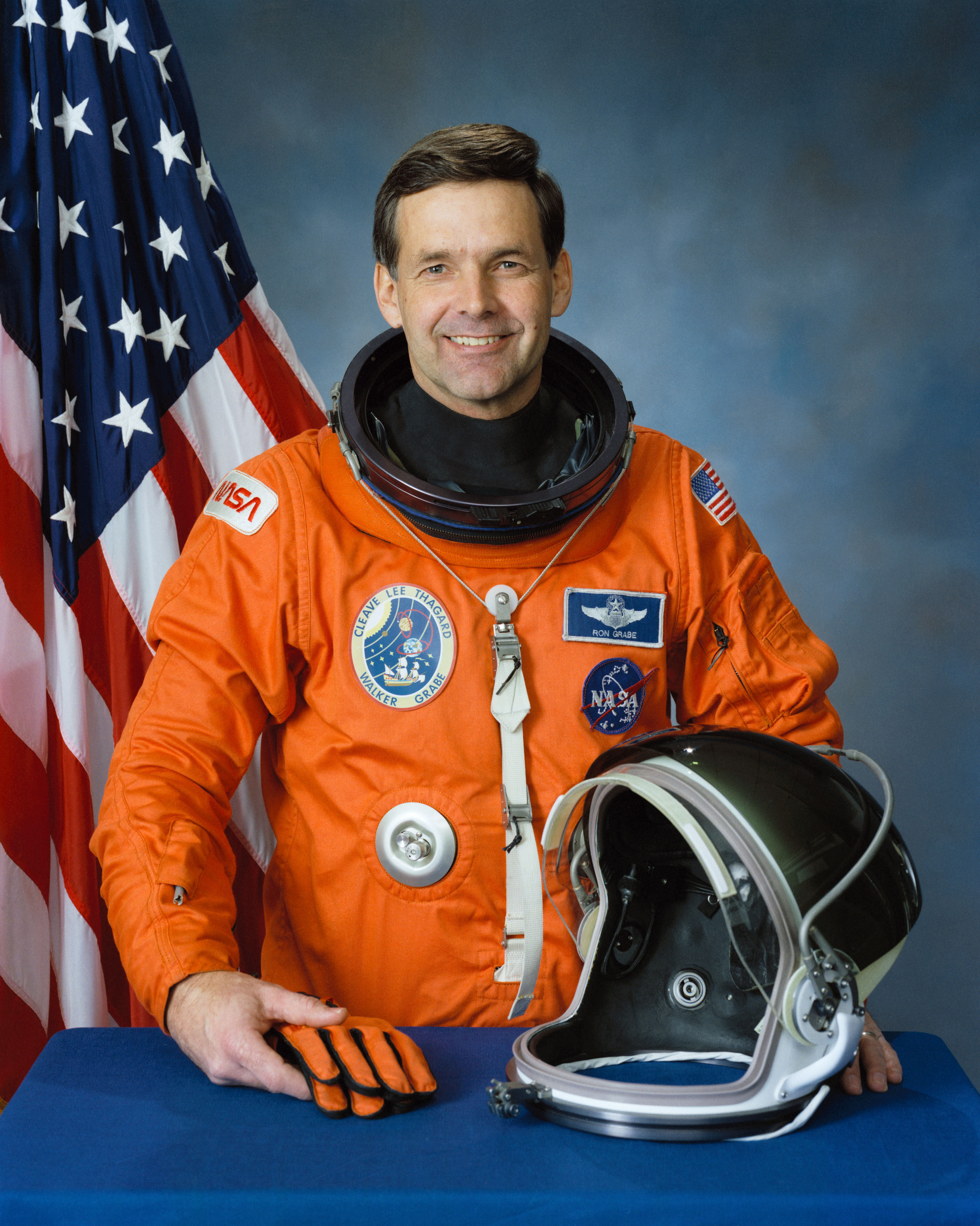 portrait astronaut Ronald Grabe